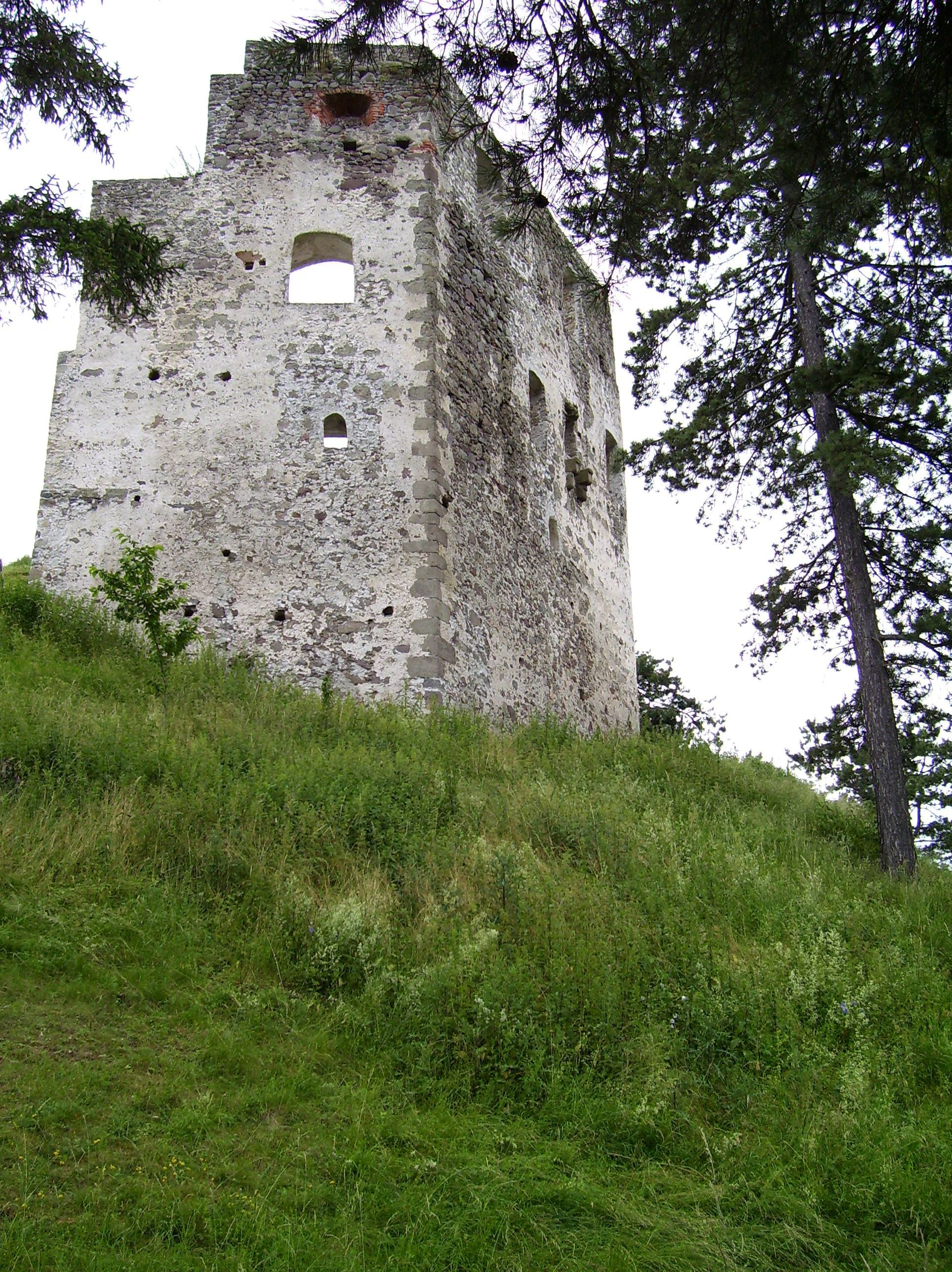 Dobronya várának falmaradványa Dobróváralja (Podzámčok) közelében Szlovákiában